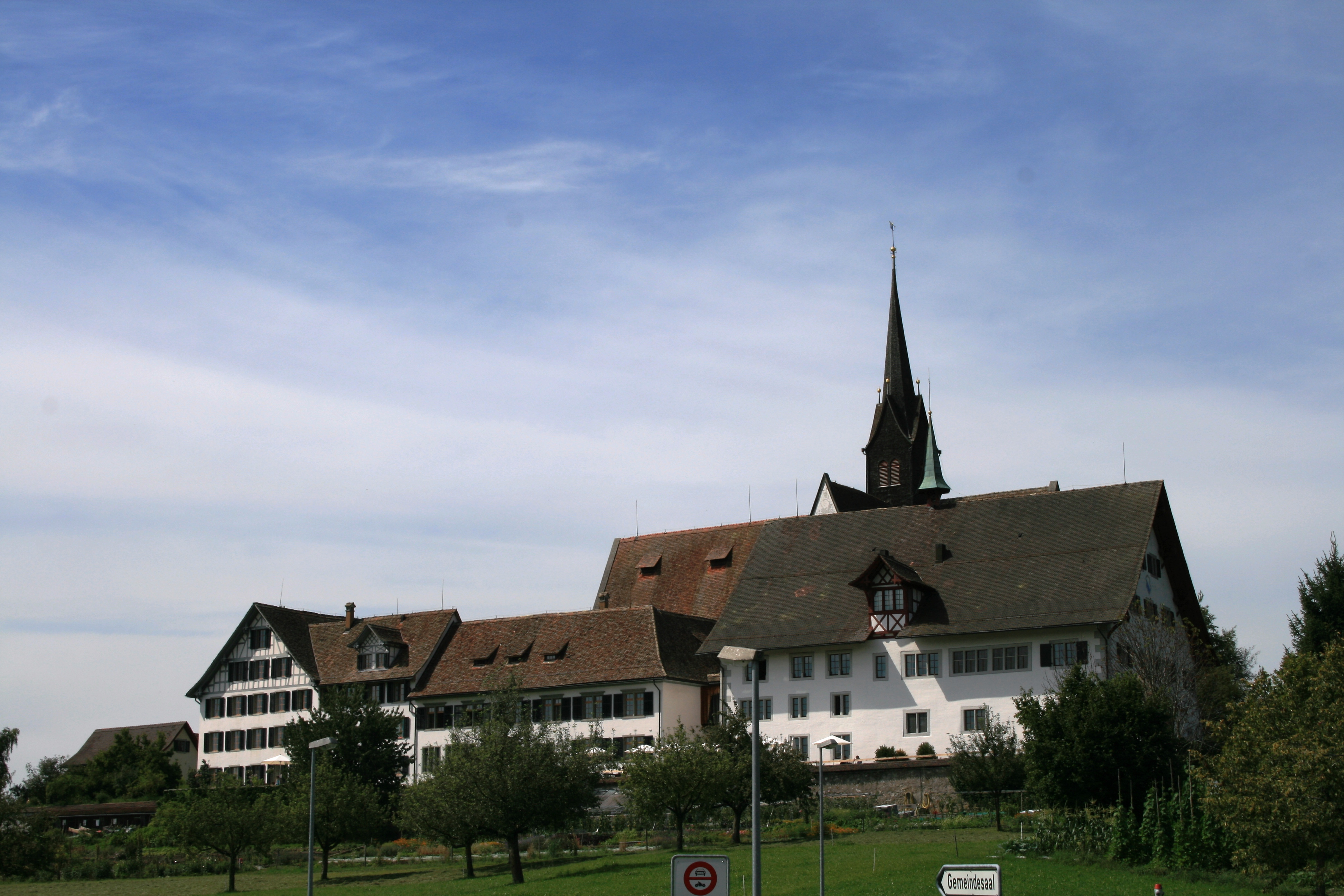 Kloster Kappel am Albis